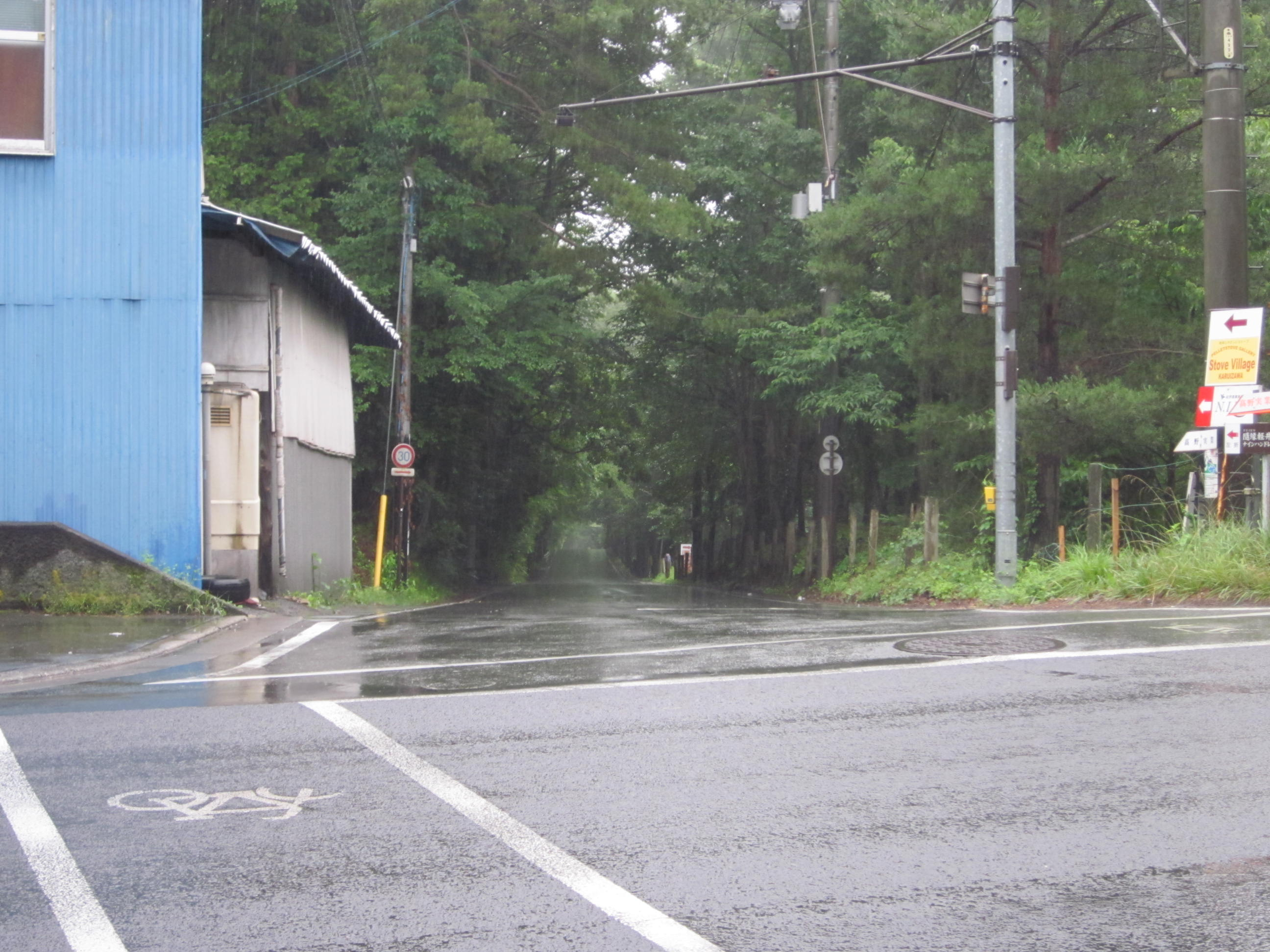 長野県道137号借宿小諸線起点（長野県北佐久郡軽井沢町追分）